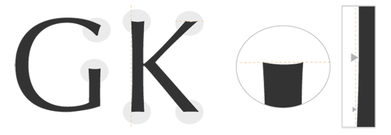 Esquema d'alguns dels trets característics de la lletra Optima